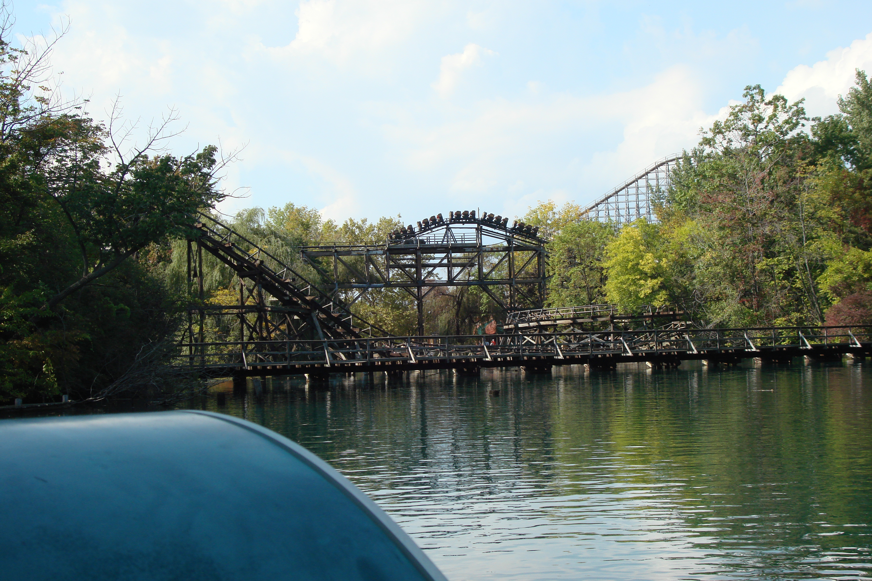 Cedar Creek Mine Ride , montagnes russes à Cedar Point